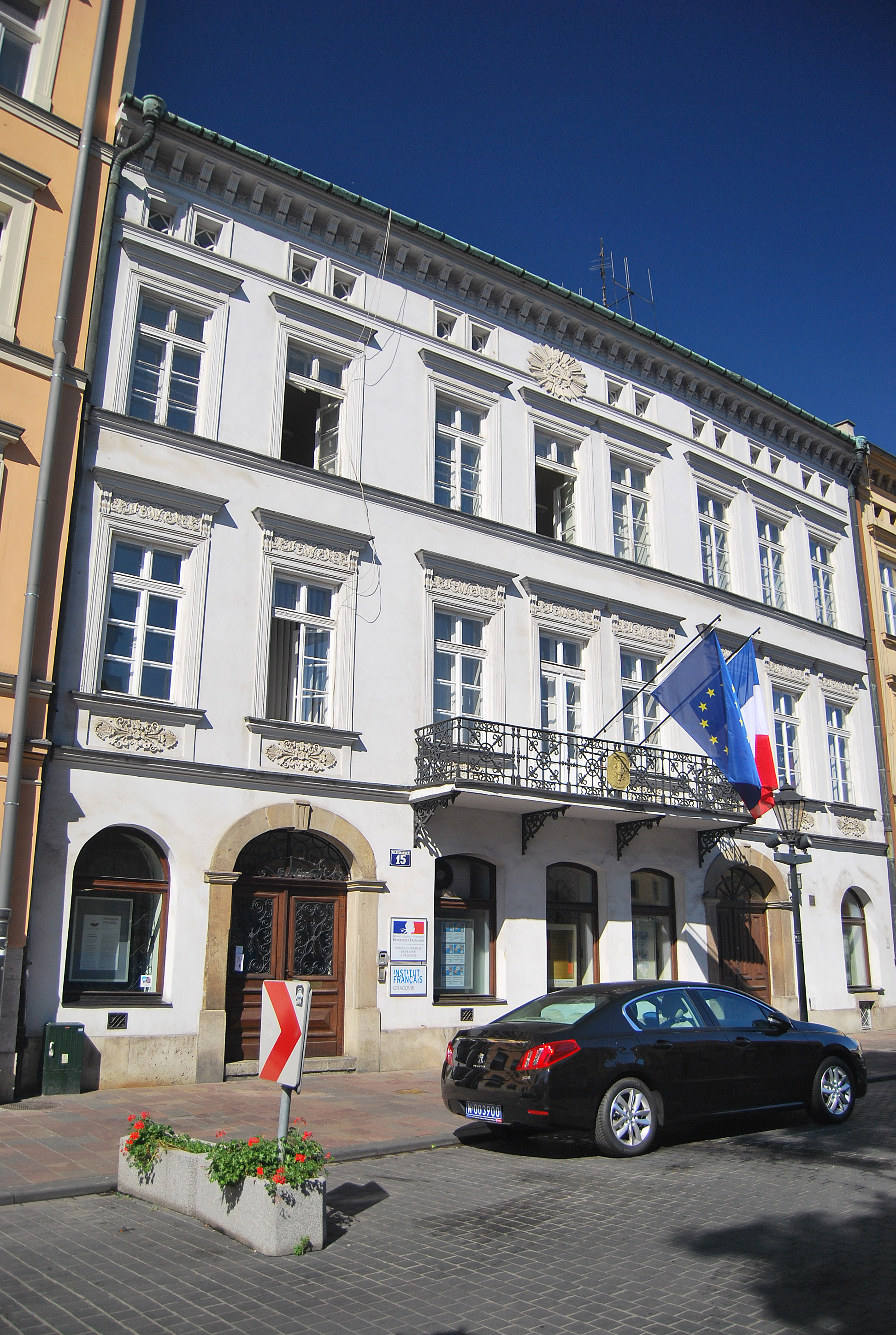 Kamienica przy ulicy Stolarskiej 15 w Krakowie, widok od frontu.